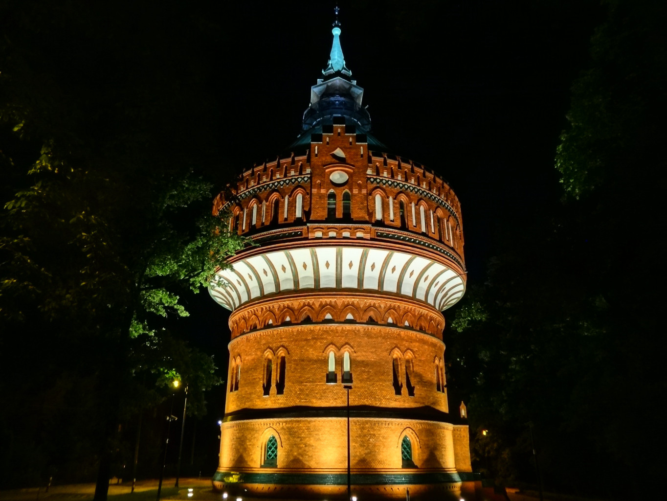 Wieża ciśnień w Bydgoszczy przy ul. Filareckiej, zbud. w 1900 roku, w gestii Miejskich Wodociągów i Kanalizacji, mieści Muzeum Wodociągów, galerię sztuki, a na szczycie galerię widokową